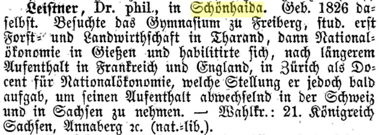 Schönheide im Erzgebirge: Karl Leistner (1825-1874) wurde in Schönheide geboren. Ein Bericht über seinen Werdegang. Zu diesem Zeitpunkt war er Mitglied im Norddeutschen Reichstag (Hirth’s Parlaments-Almanach für 1869, 8. Ausgabe 15. April 1869, Verlag Franz Dunker, Berlin 1869, S. 178 Digitalisat)